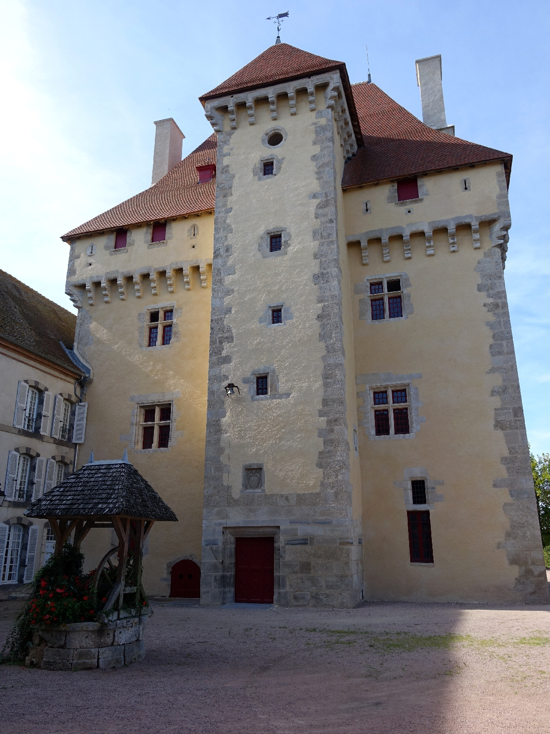 Château de Gayette